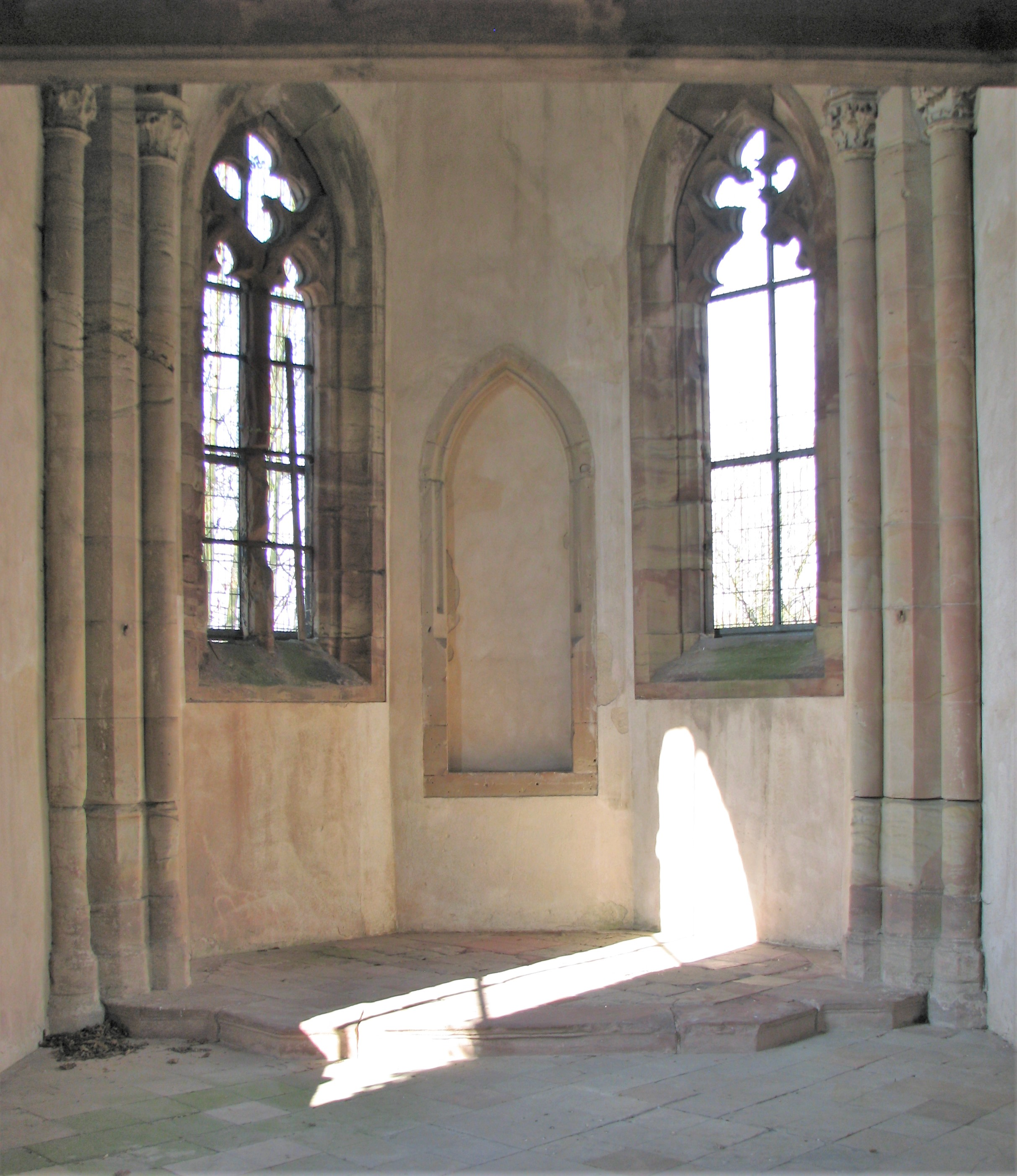 Stummsche Kapelle Neunkirchen (Saar) Innenansicht